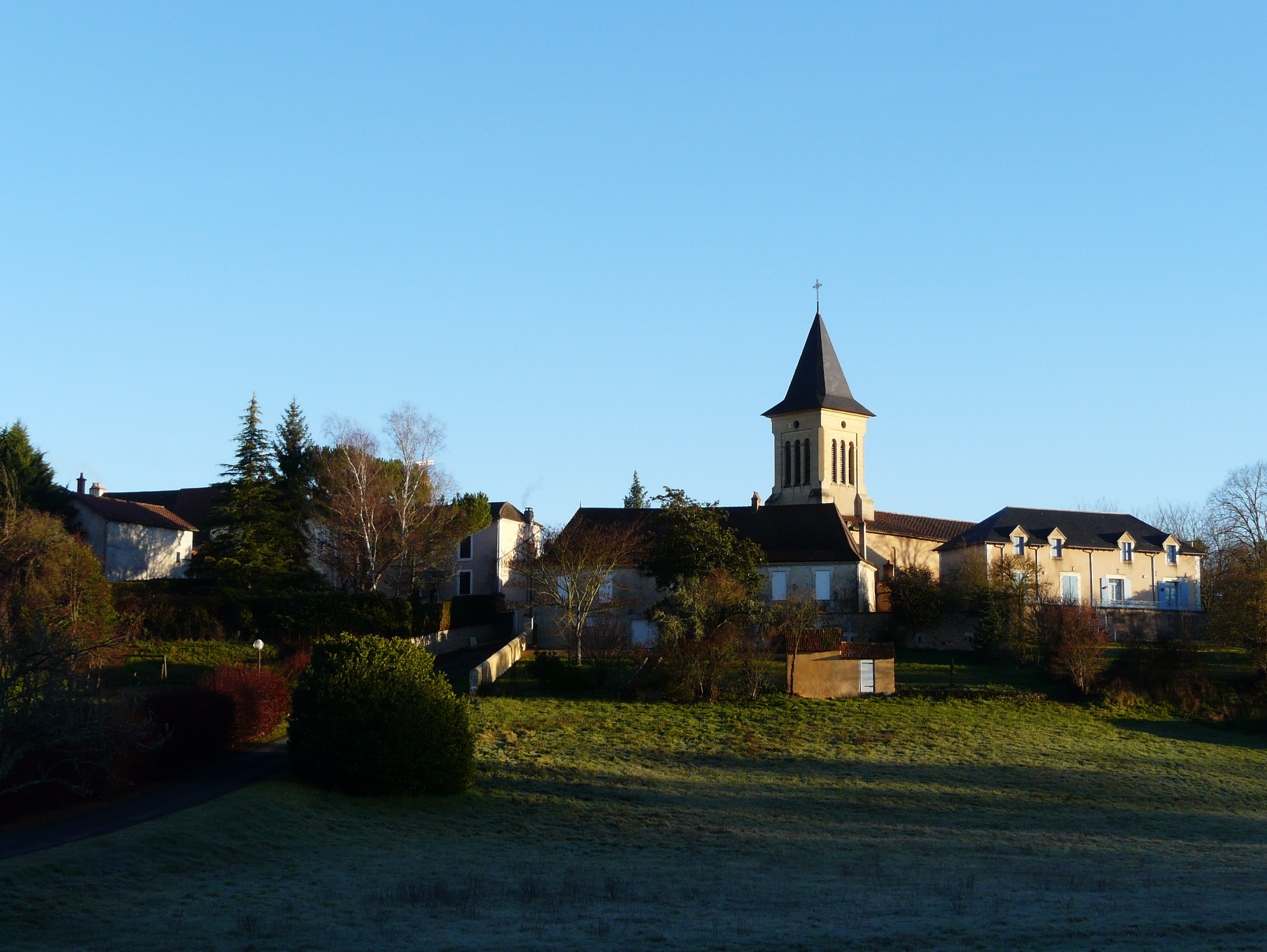 Le village de Lacropte, Dordogne, France.